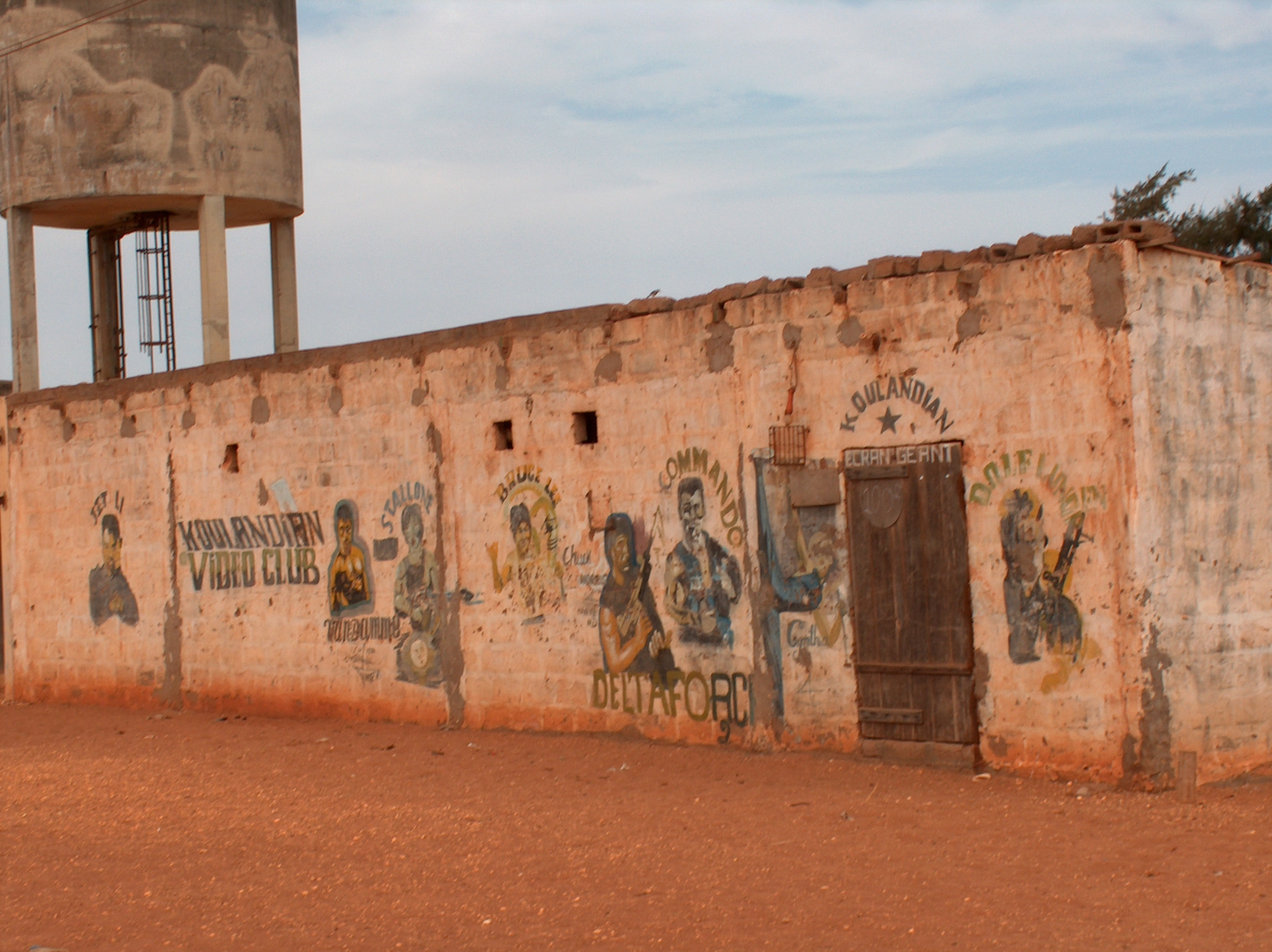 Vidéo-club à Djifer, dans le Siné Saloum (Sénégal)